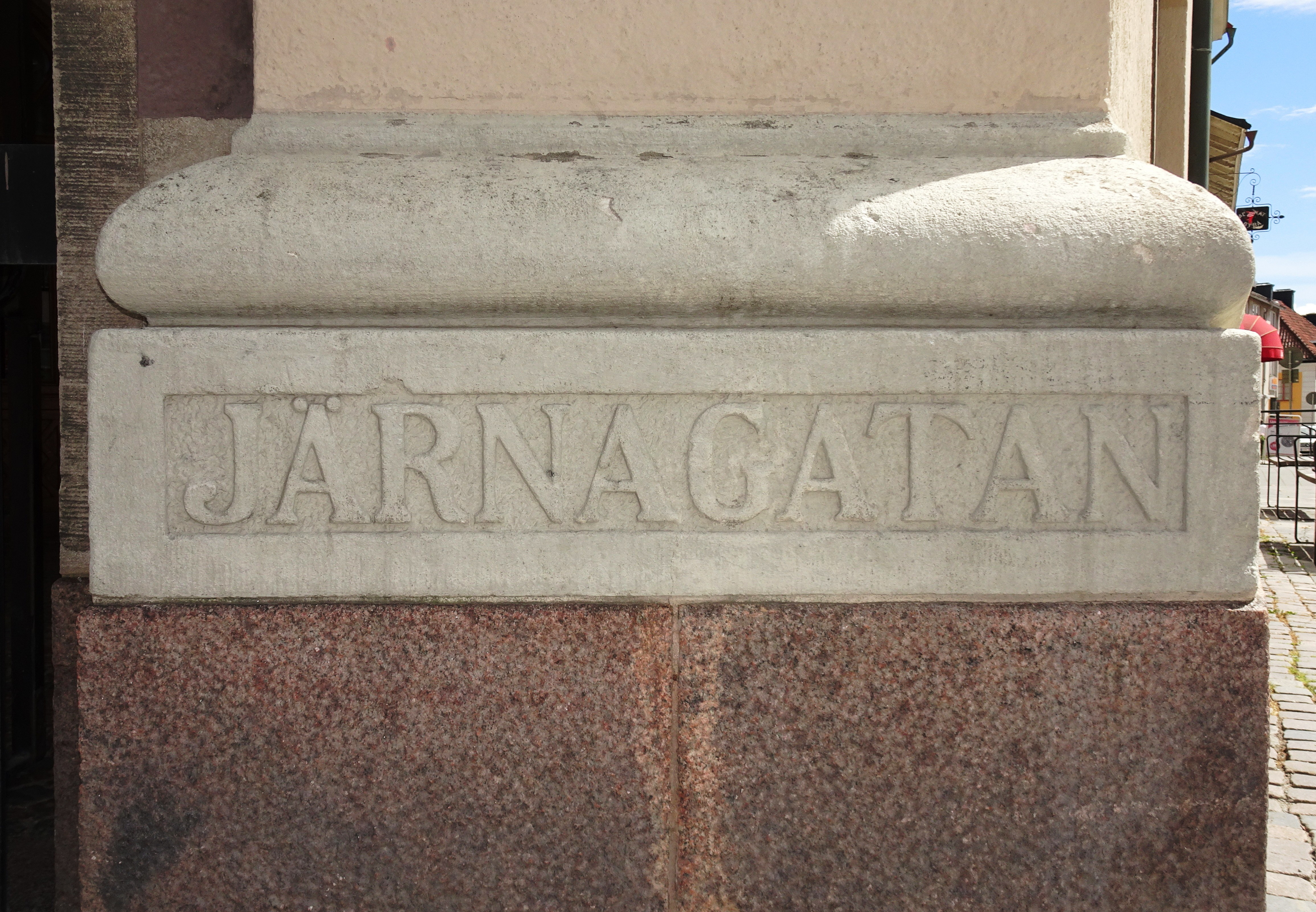 Järnagatan gatunamn på Väduren 10